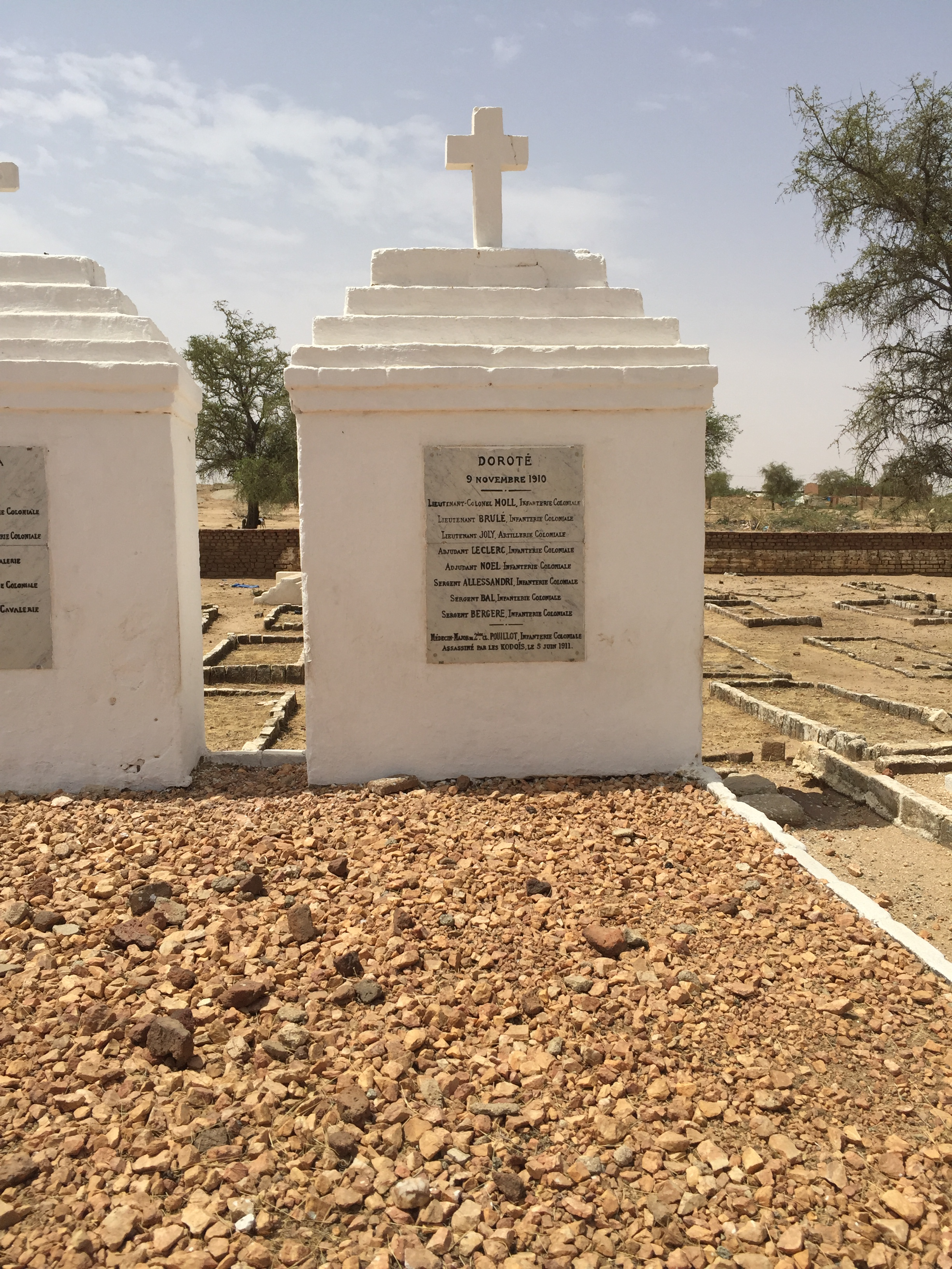 Monument